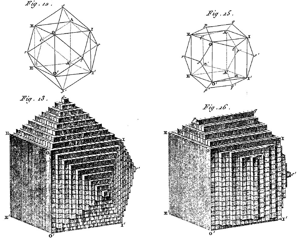 Molécules intégrantes d'un cristal cubique d'après Traité de Minéralogie (1801) par René Just Haüy (1743-1822)